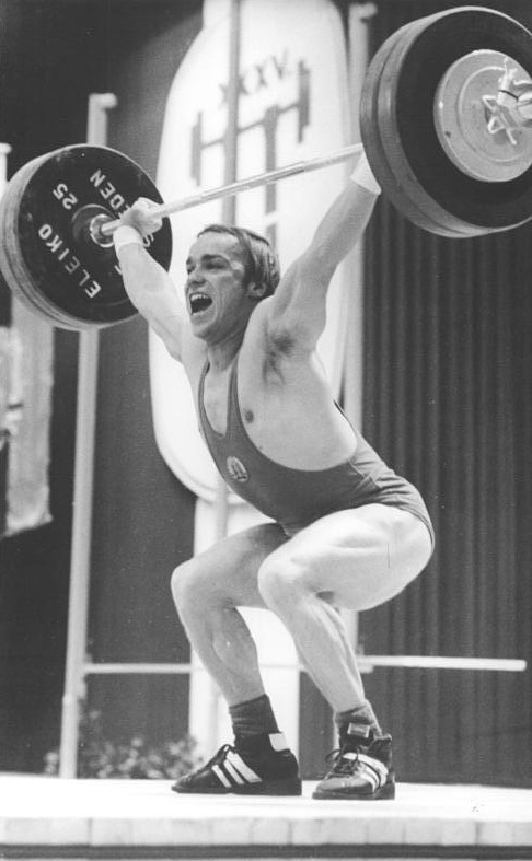 Peter Wenzel ADN-ZB Mittelstädt 7-11-79 Saloniki: Gewichtheber-Weltmeisterschaften- Im Mittelgewicht erkämpfte der DDR-Heber Peter Wenzel mit der Zweikampfleistung von 337,5 kg die Bronzemedaille. Im Reißen (unser Archivfoto) brachte er 147,5 kg zur Hochstrecke. Die 190 kg im Stoßen bedeuteten sogar die Slbermedaille in dieser Disziplin.